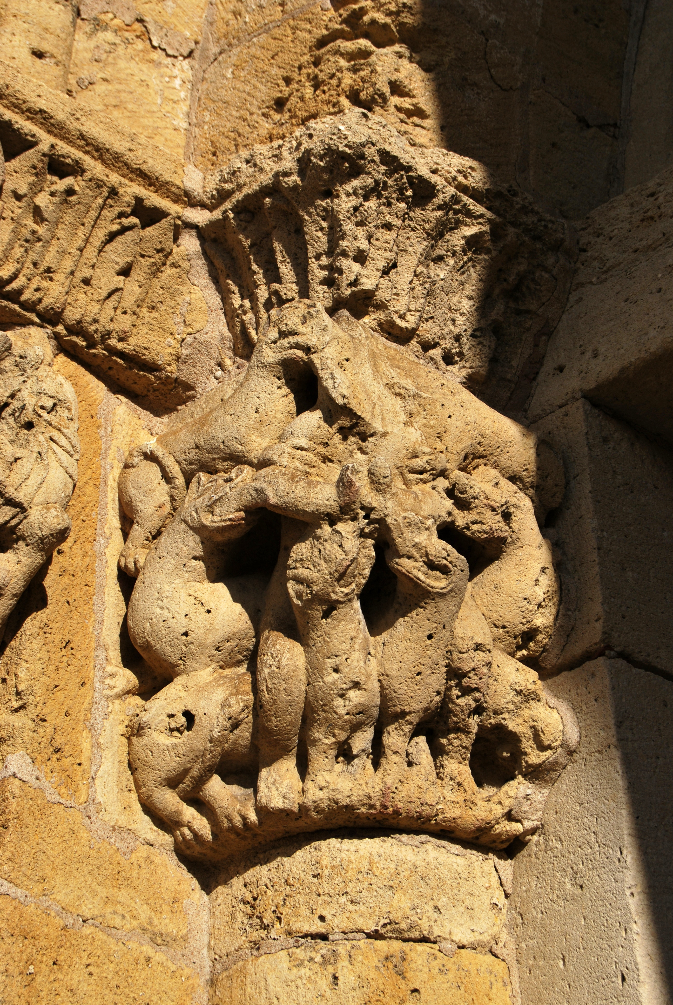 Église Saint-Vincent (Saint-Vincent-de-Pertignas)